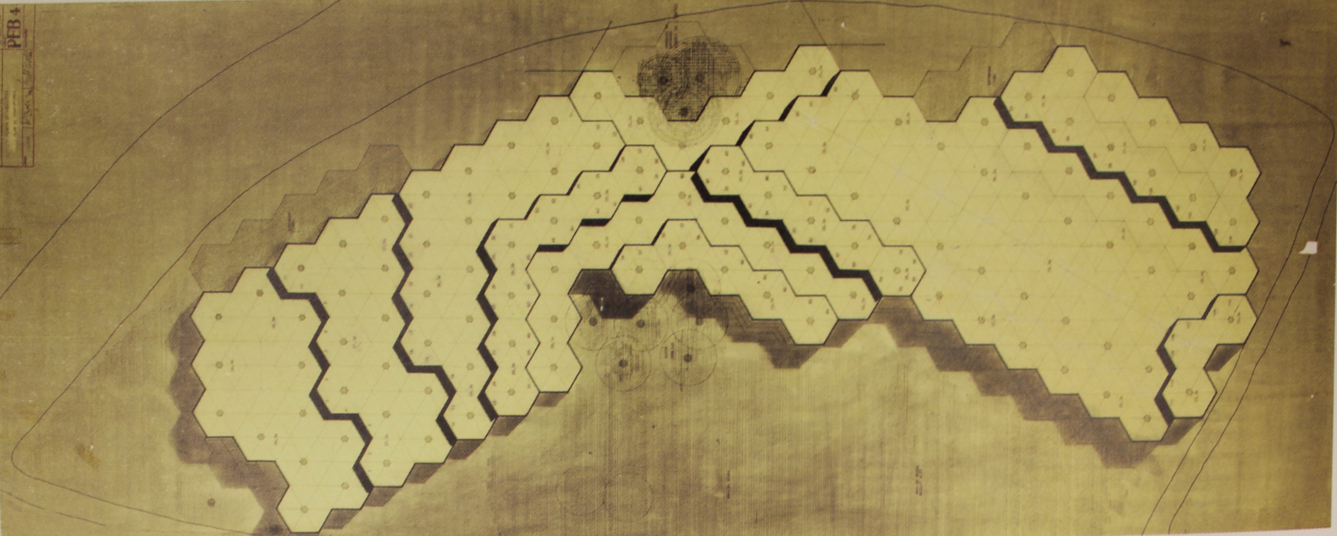 Plano superior del Pabellón de España.